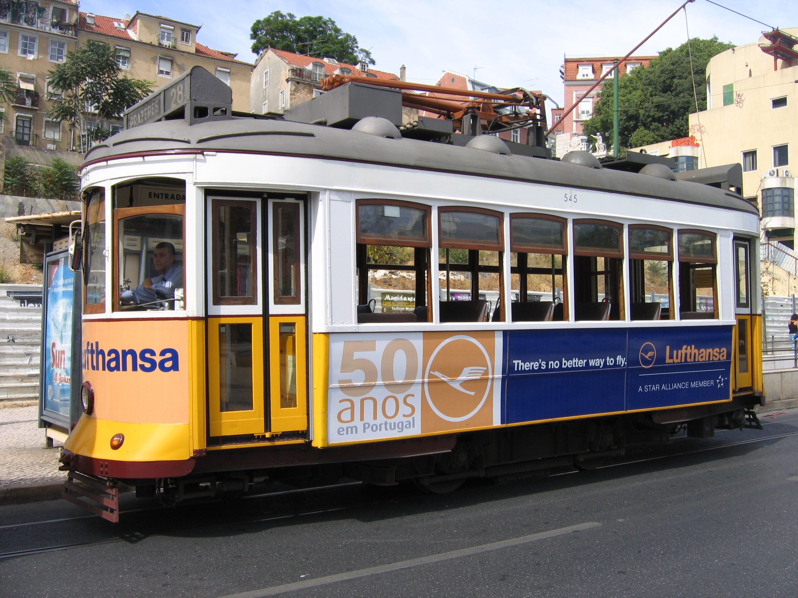 Local: Martim Moniz em Lisboa, com publicidade aos 50 anos da Lufthansa.